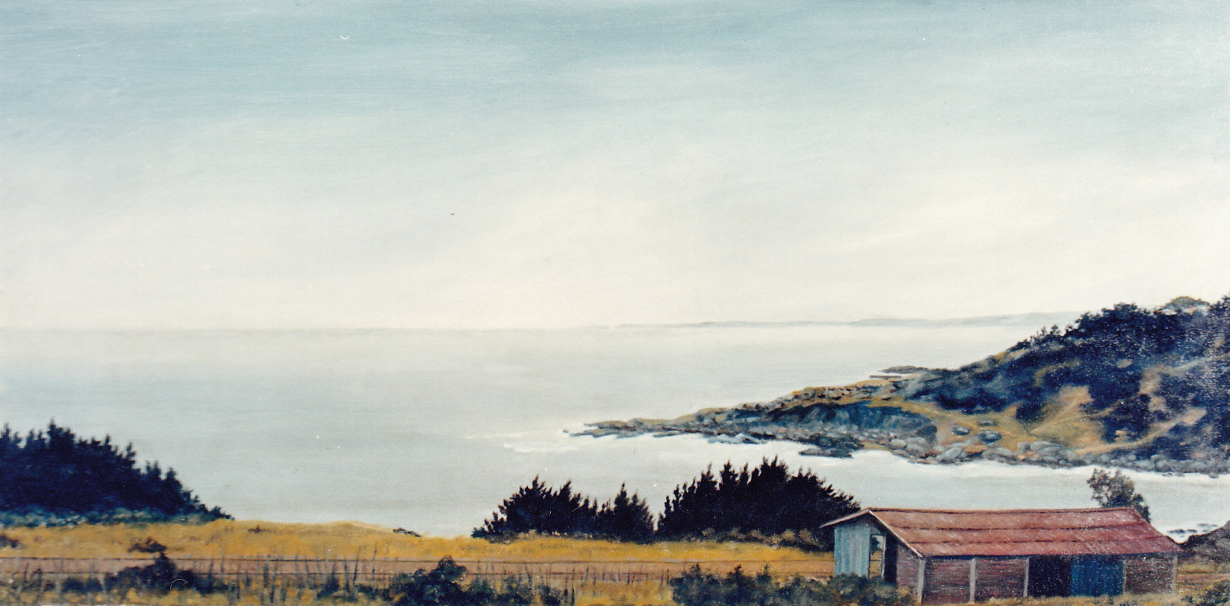 Pintura de Eugenio Cruz Vargas (1923-2014). Técnica: óleo sobre tela. Tema: paisaje situado al norte del puerto de San Antonio, Chile. Medidas: 100 x 180 cm. Autora de la fotografía: Liliana Fuentes, quien por el consentimiento del propietario titular de los derechos de autor de la obra, publica esta fotografía en internet bajo la Licencia de Uso Creative Commons, Atribución-Compartigual 3.0 Unported (CC BY-SA 3.0).